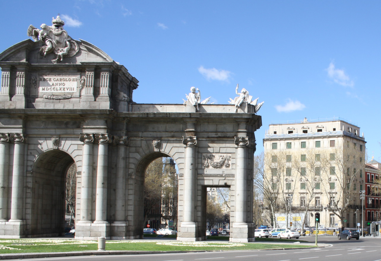 Edificio de la Camara de Madrid situado en la plaza de la Independencia, en la Puerta de Alcala.